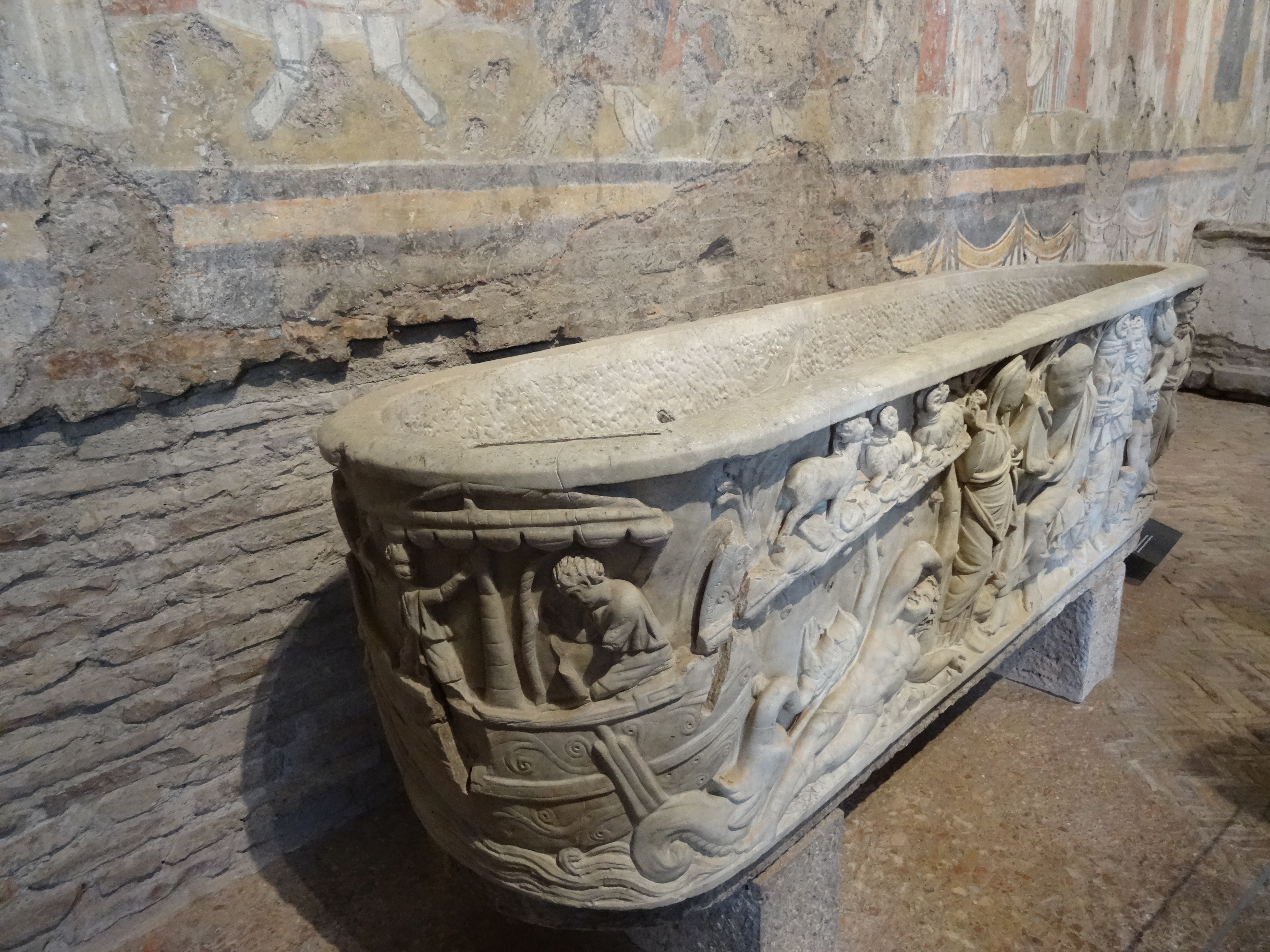 20160425 030 Roma - Foro Romano - Santa Maria Antiqua